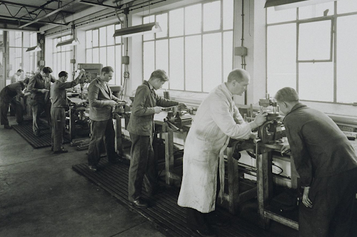 Ausbildung Historie